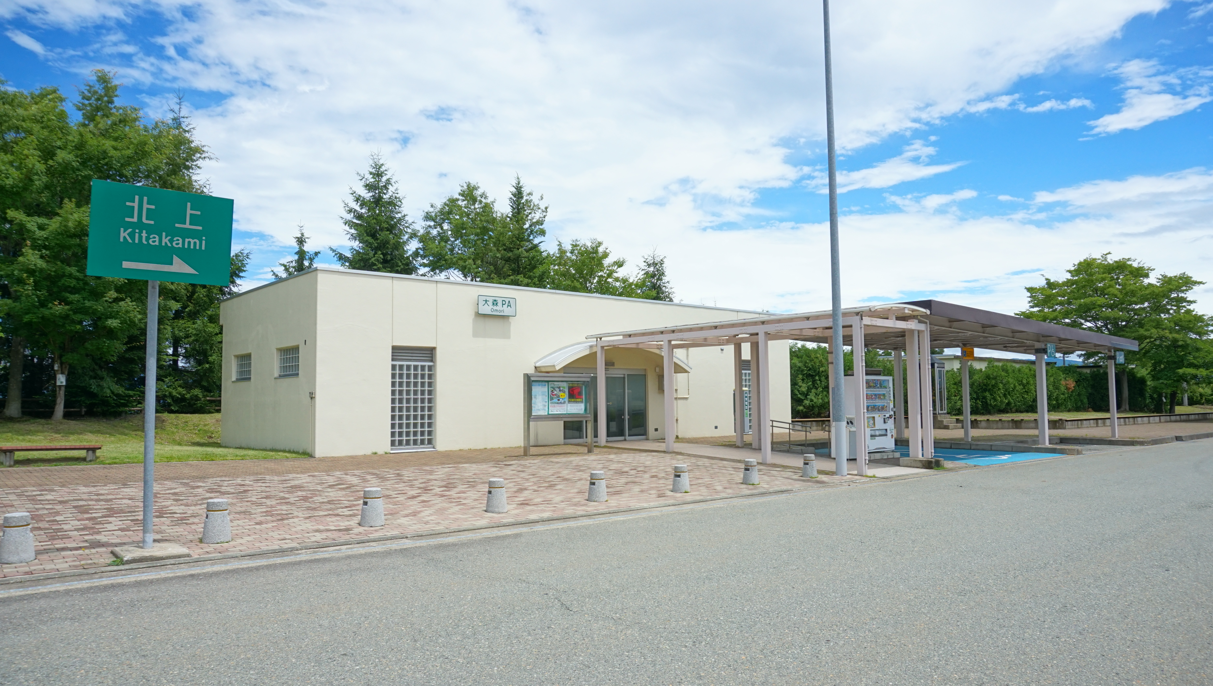 秋田自動車道 大森パーキングエリア（上り線）